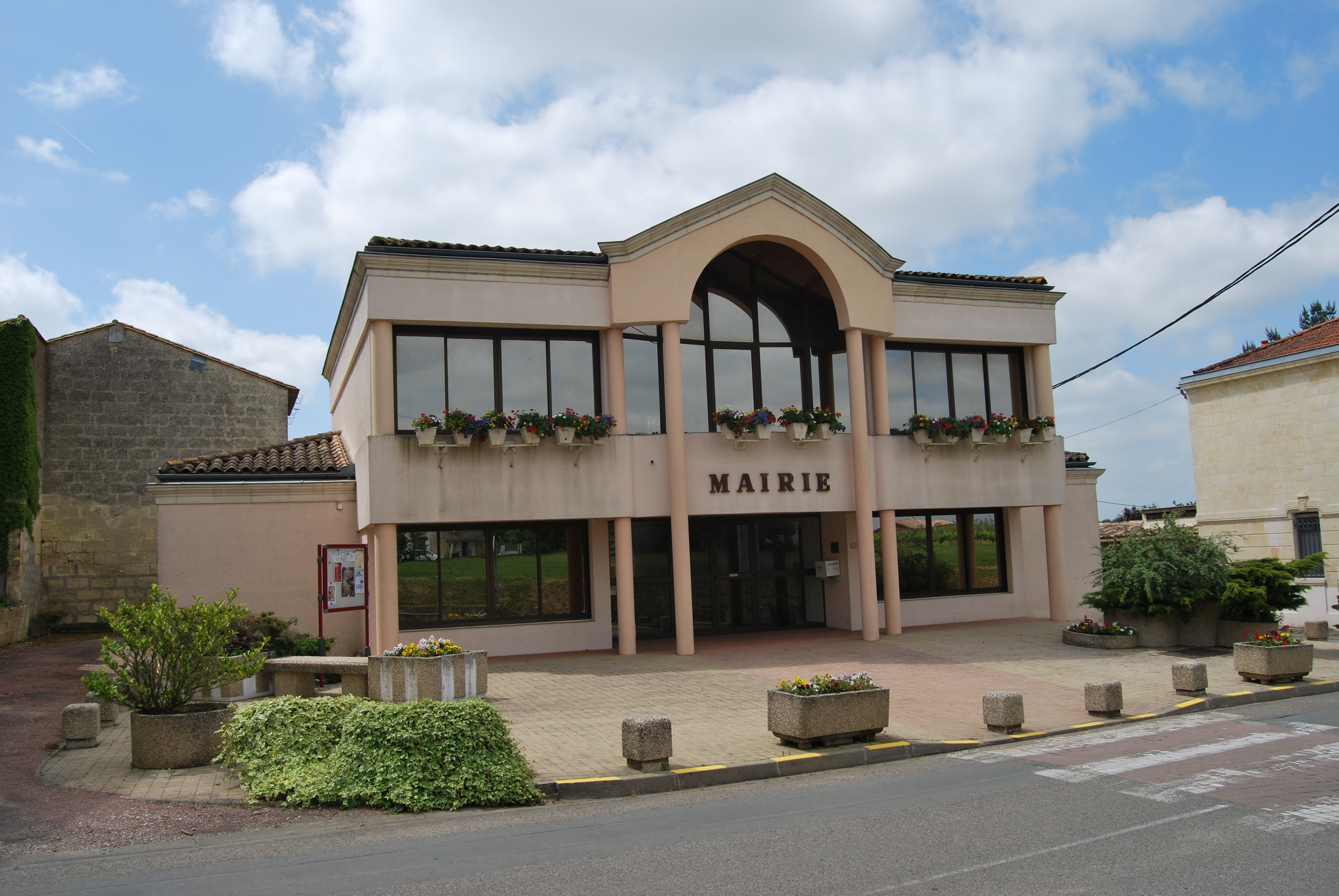 Nérigean